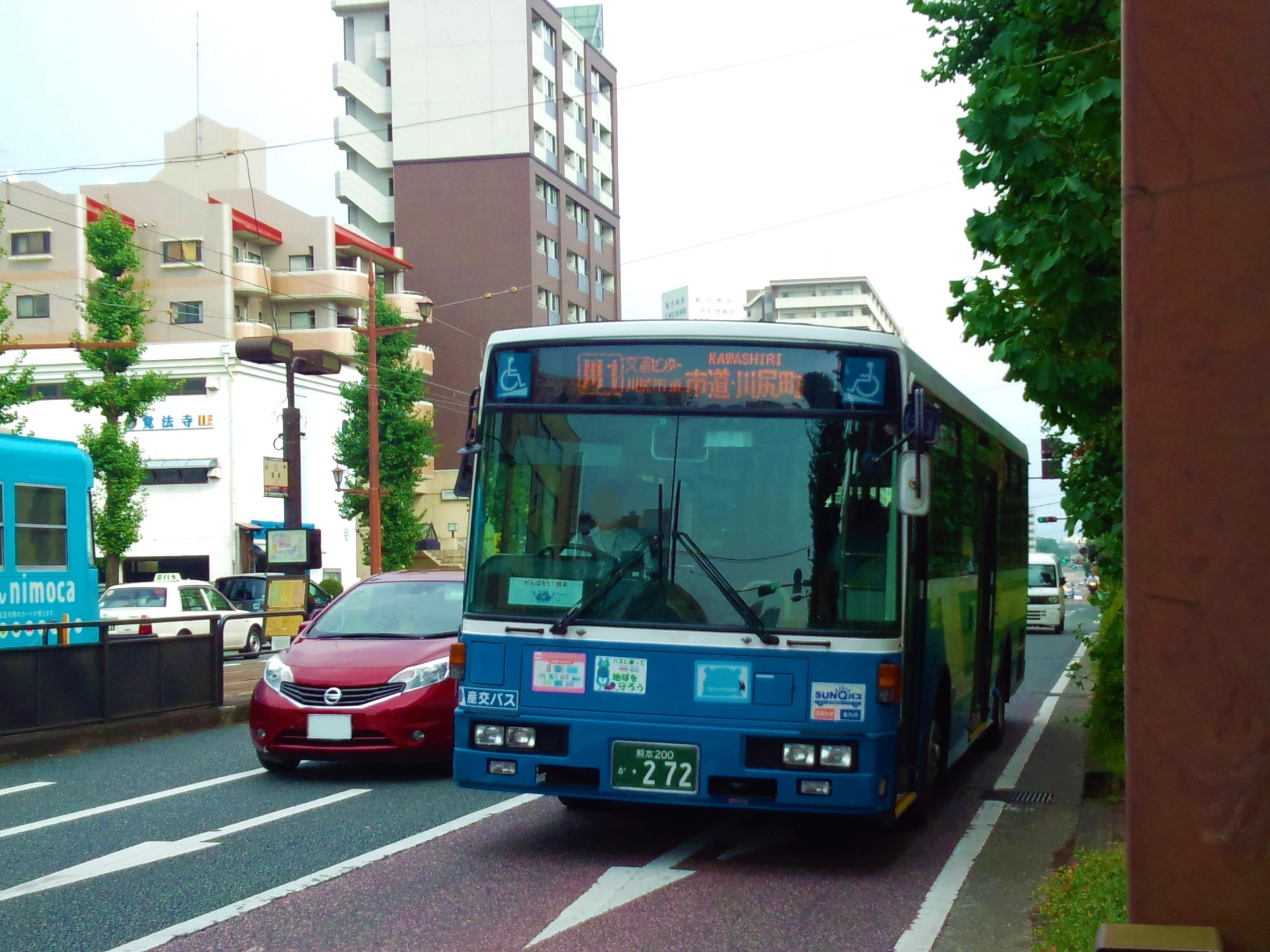 九州産交バスのいすゞKL-LV280N1エルガ、富士重工業17E型車体架装車